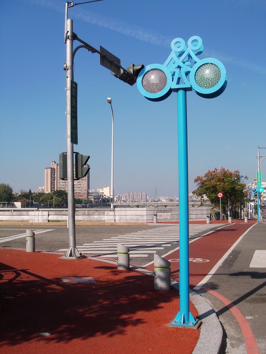 旱溪自行車道專用號誌燈